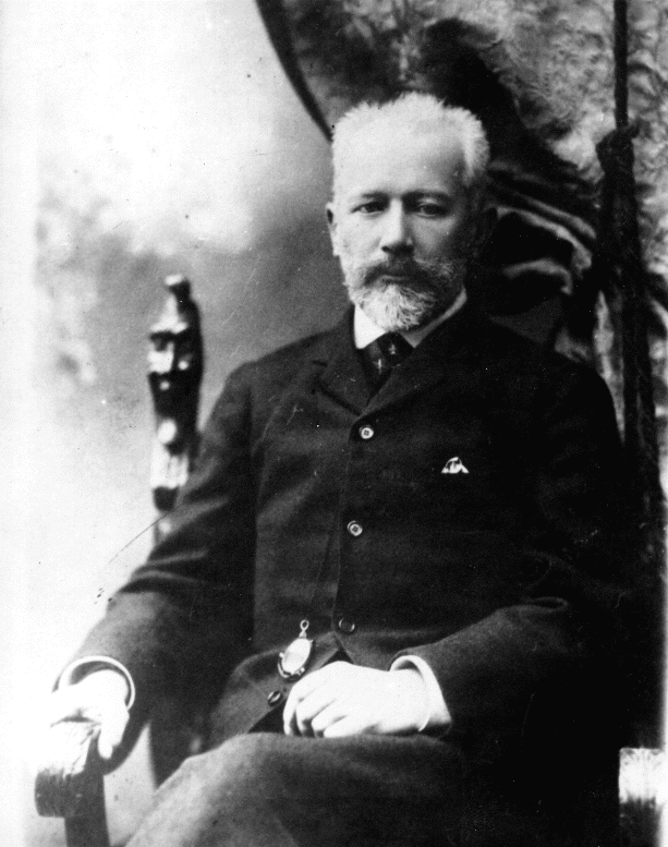 Čajkovskij ritratto da Franciszek de Mezer a Kiev